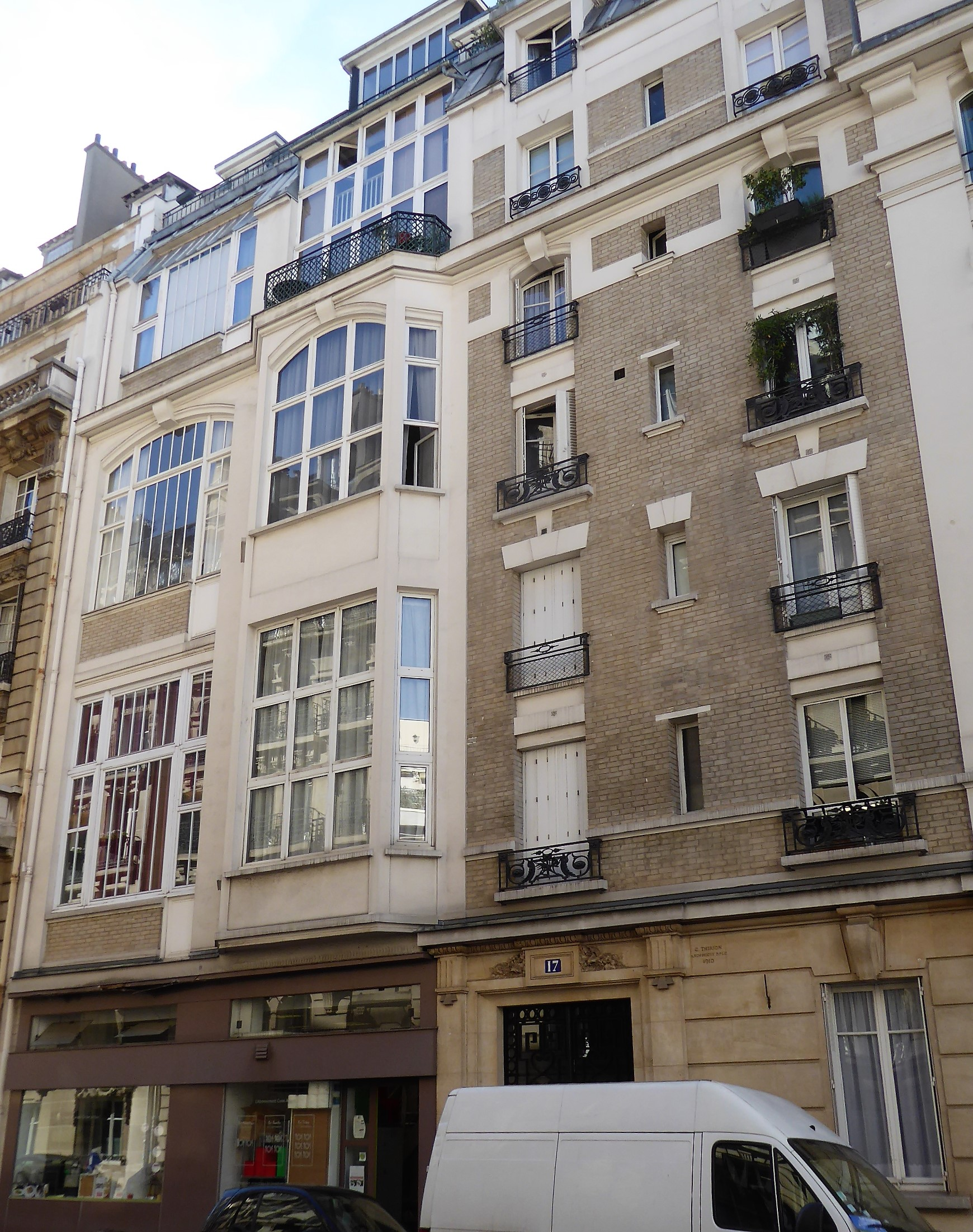 Rue Saint-Senoch 17